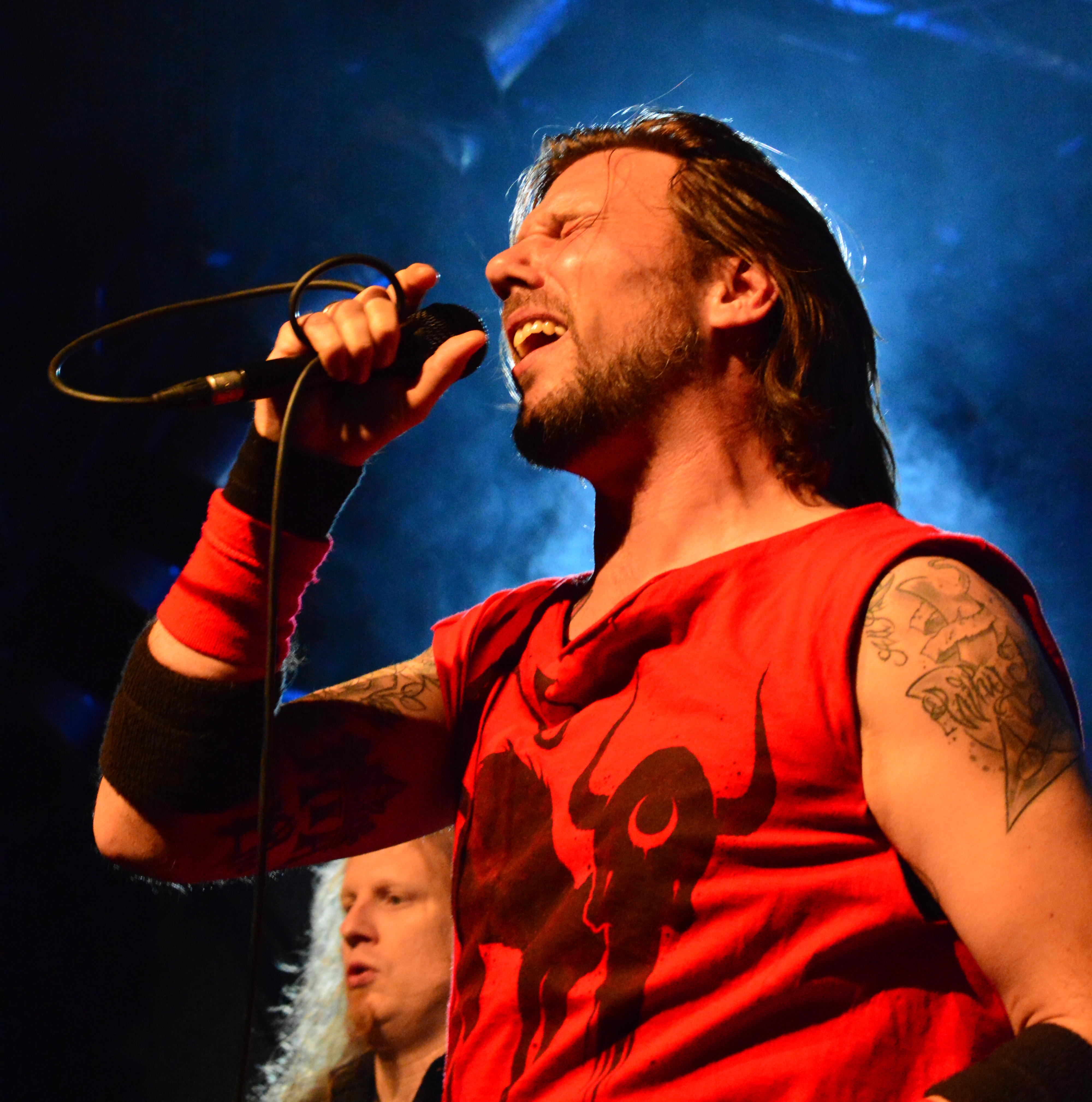 Sänger Markus Hammer von The New Black bei den Hamburg Metal Dayz 2013